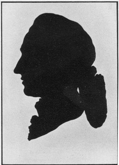 Goethe Lebensgroßer Scherenschnitt um 1778